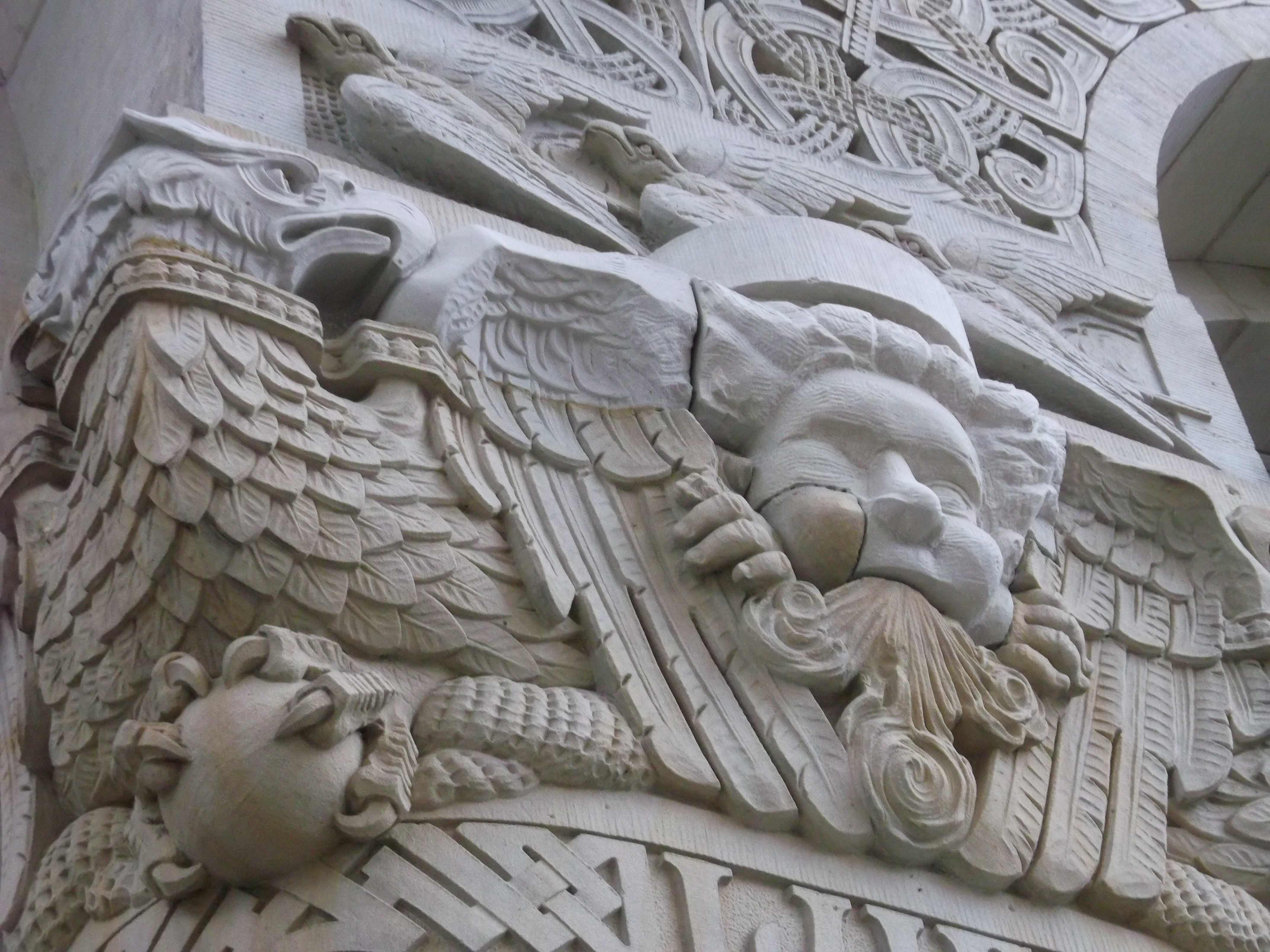 Goethe-Gymnasium Wilmersdorf: Detail der Aussenfassade an der Uhlandstr. Kapitel, symbolisierend das Element "Luft", teilweise ausgebessert nach Kriegsbeschädigung und vor kurzem gereinigt.